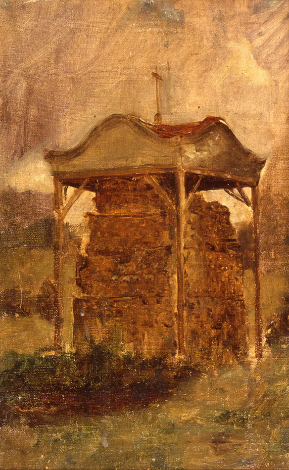 Фотографија слике Ђорђе Крстић Ћеле кула 1883, пренето са сајта: Овде